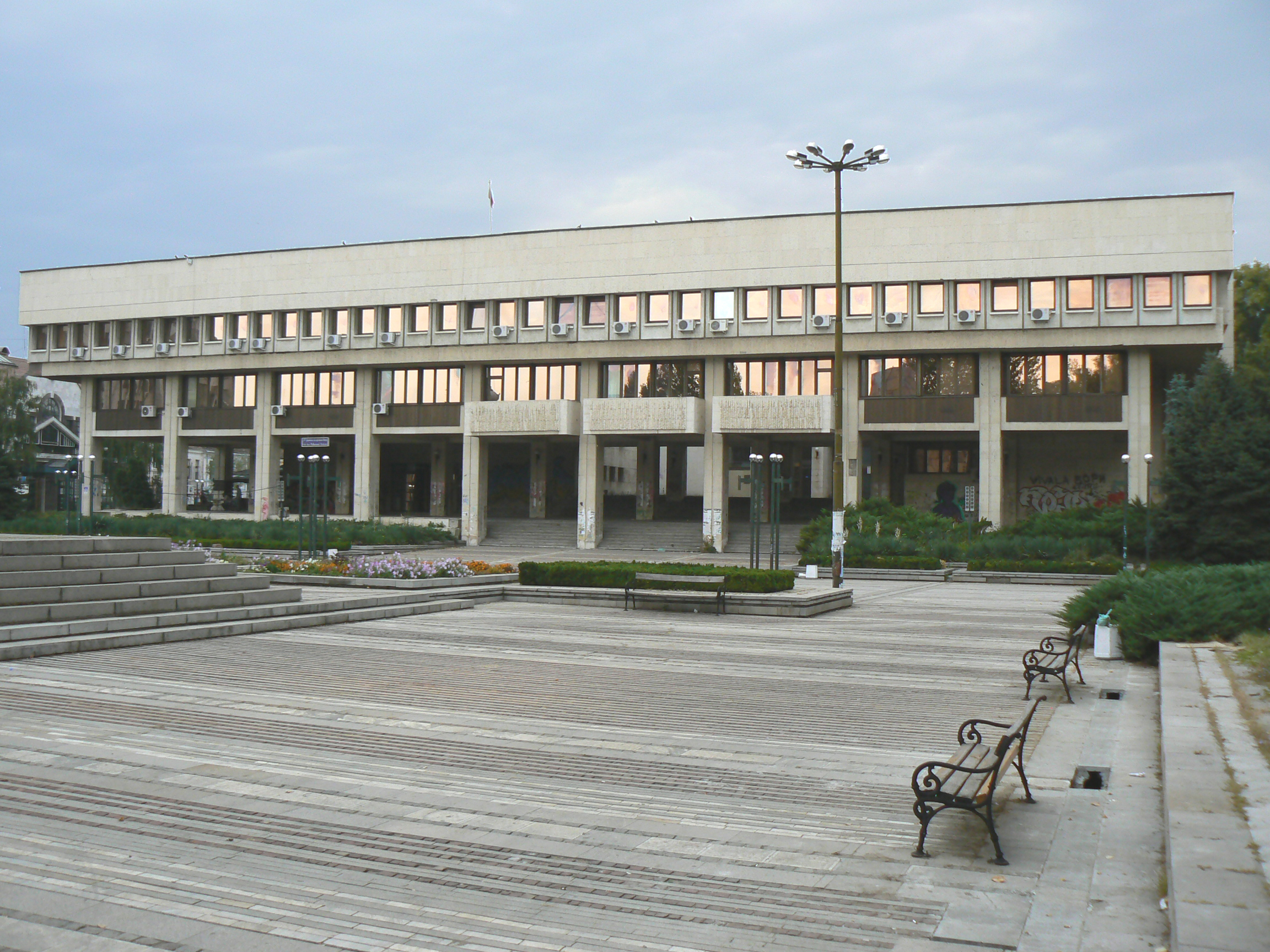 Сградата на Видинската филхармония